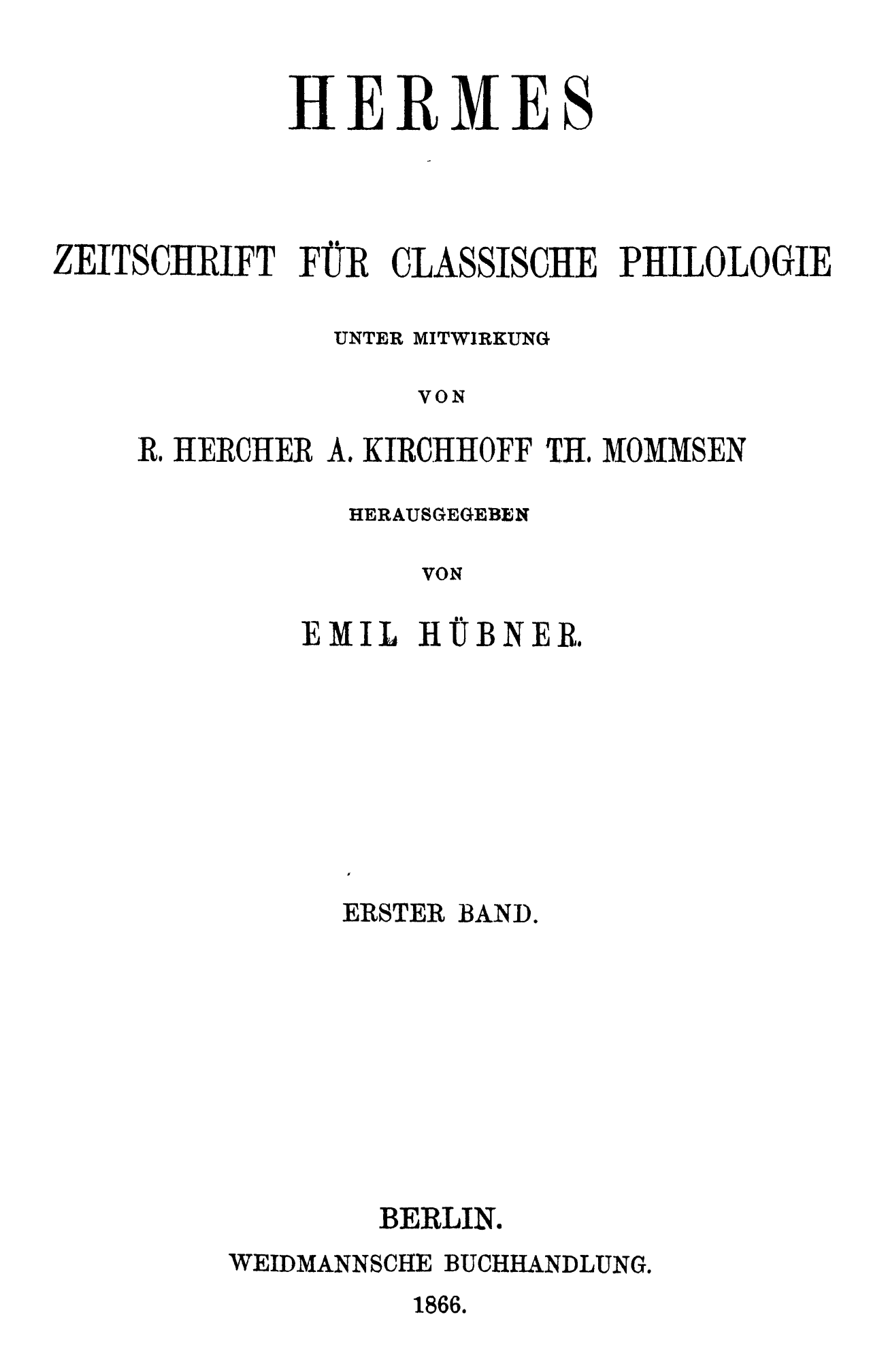 Frontispiz der ersten Ausgabe der Zeitschrift Hermes. Zeitschrift für classische Philologie